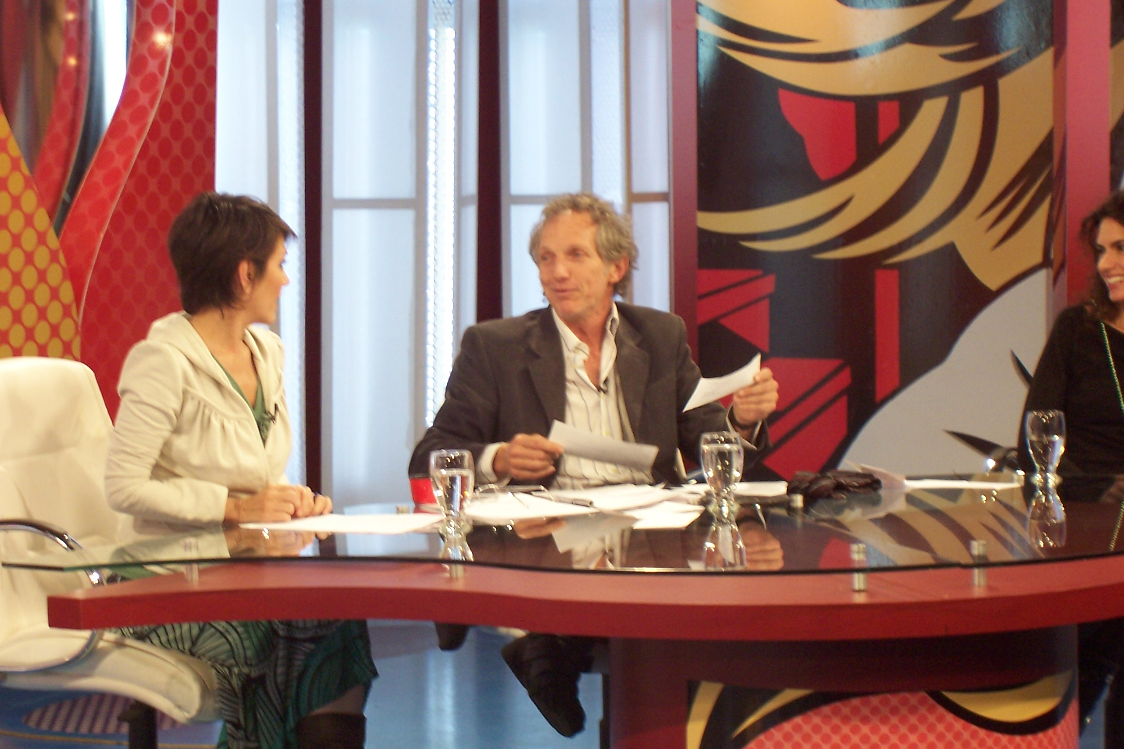 Déjamelo Pensar, programa emitido en vivo de Lunes a Viernes a las 16 hs por Canal 7 Argentina. Es conducido por el actor Boy Olmi y la periodista Sandra Russo. Agradecimientos: Hugo Barcia, Subgerente de Relaciones Institucionales y Prensa. Canal 7 Argentina.